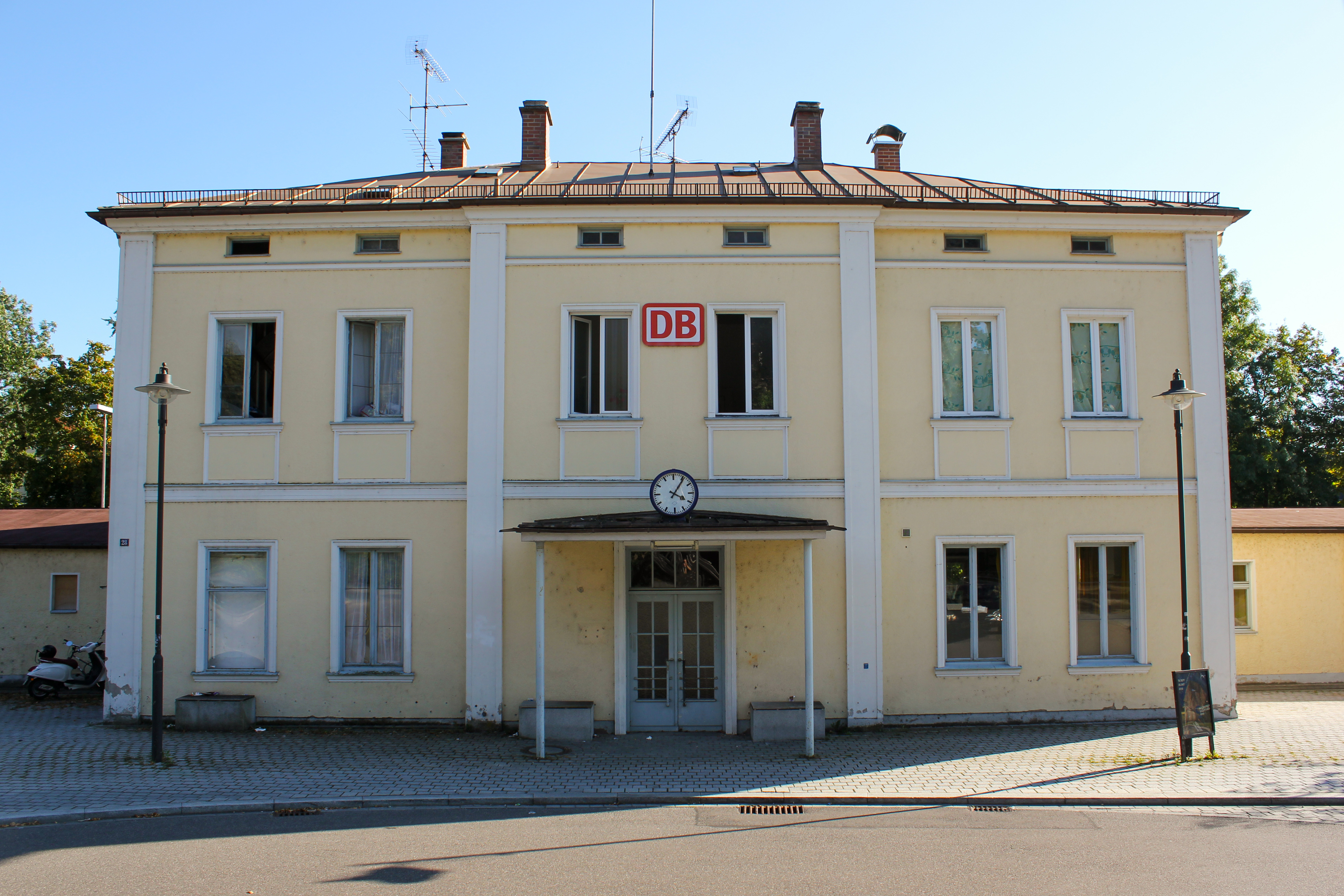 Frontaufnahme des DB Bahnhofes in Friedberg (Bayern)